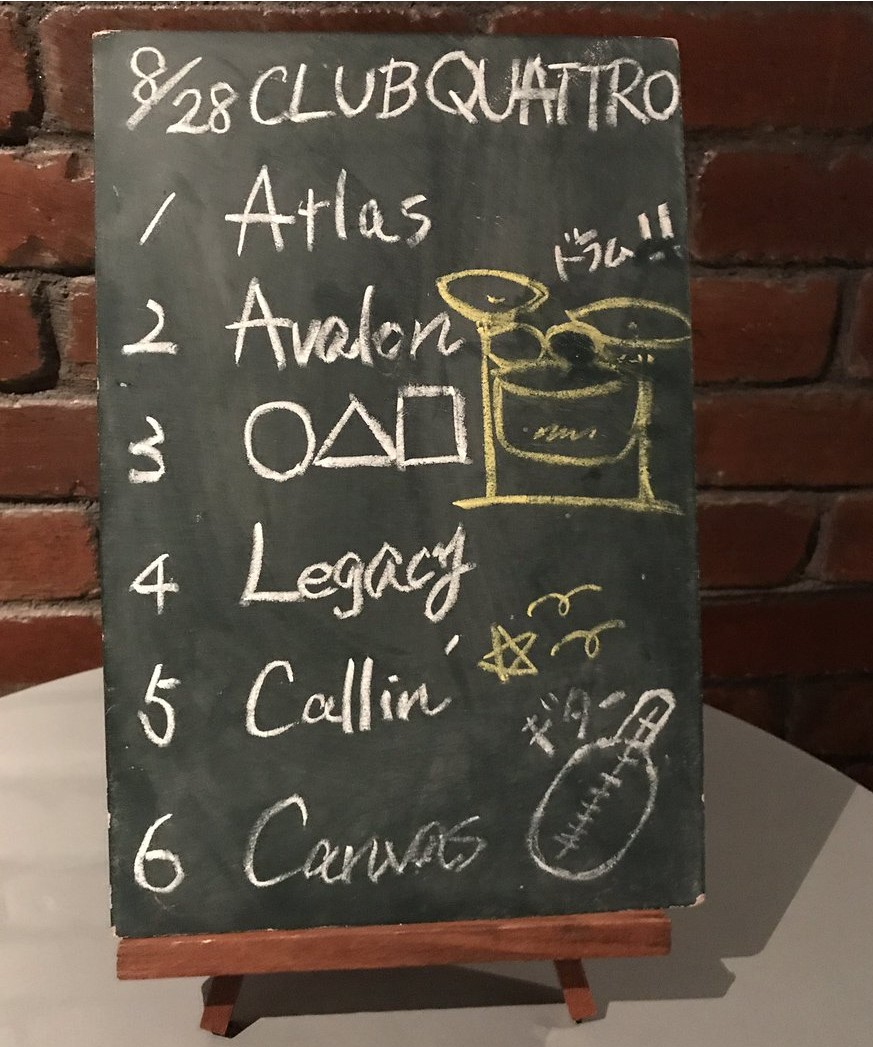 amiinAセトリボード(20170828(1))